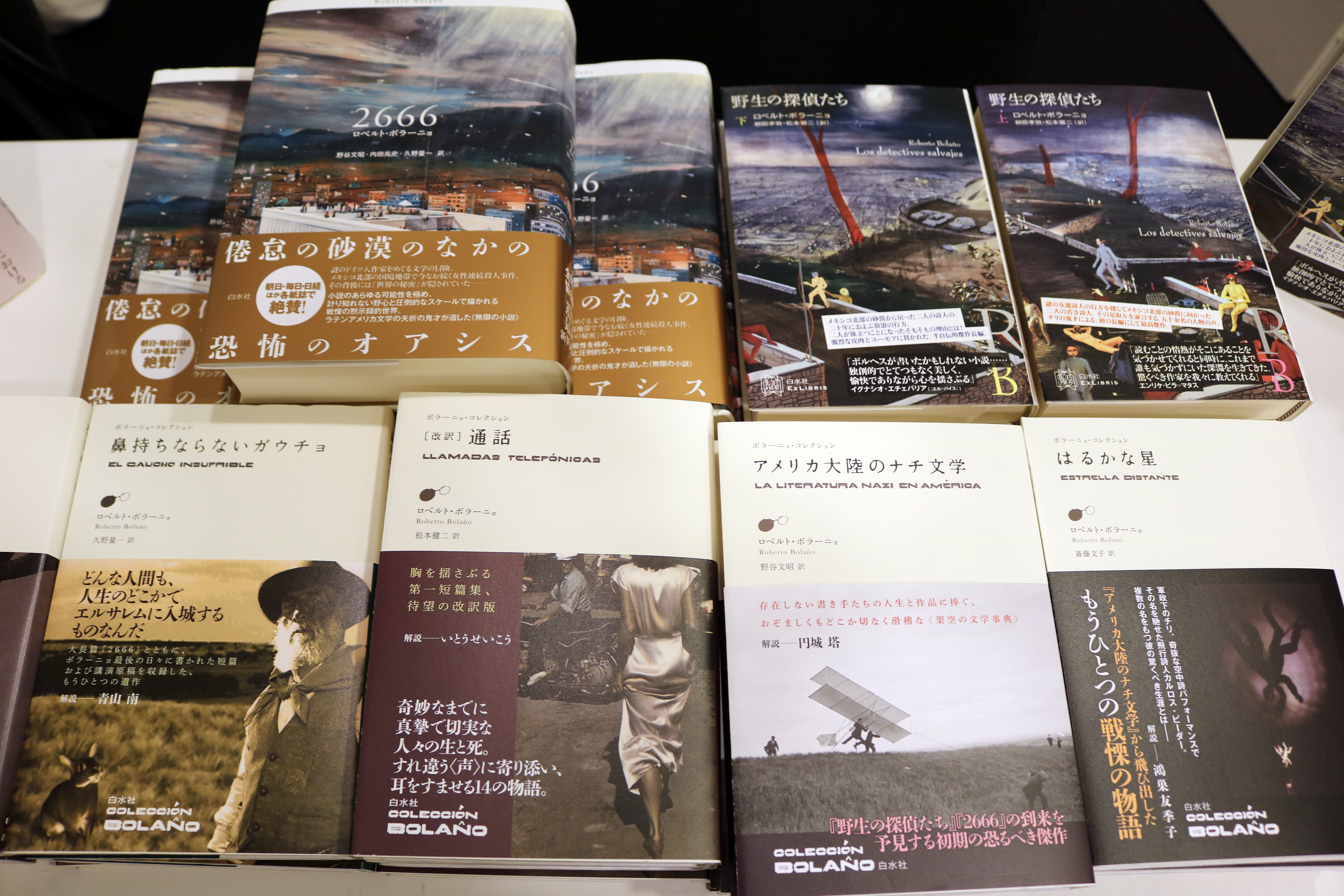 Bolaño Internacional